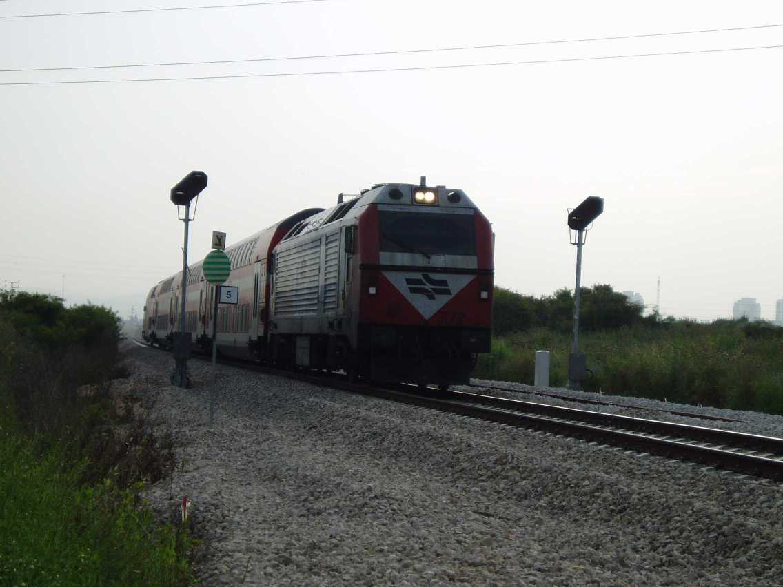 רכבת נוסעים דו-קומתית מכיוון פתח תקוה לת"א. (מתקרבת תוך צפירות, בנסיון לגרש את המשוגע שעומד ליד המסילה)